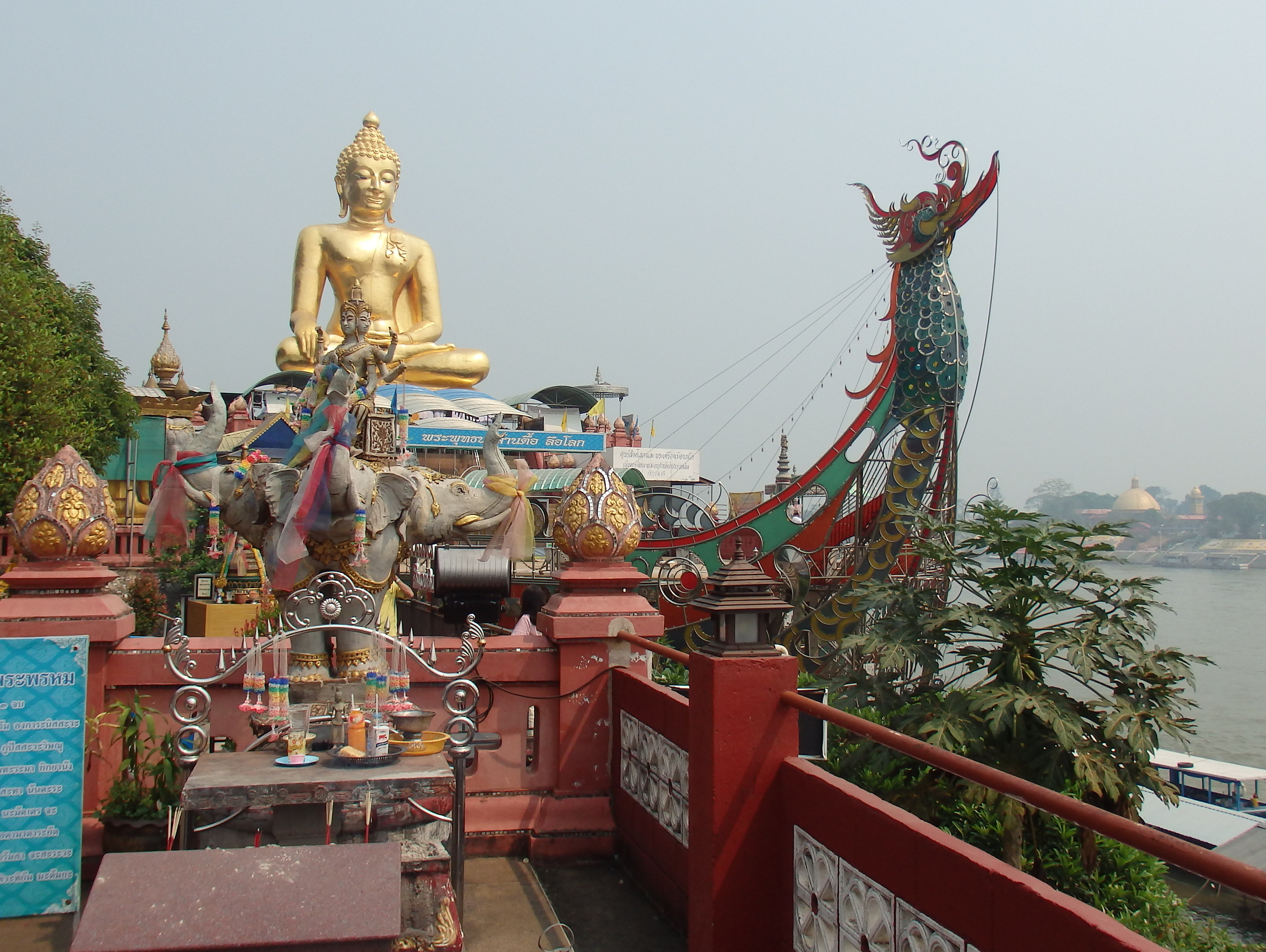 Wiang, Chiang Saen District, Chiang Rai, Thailand